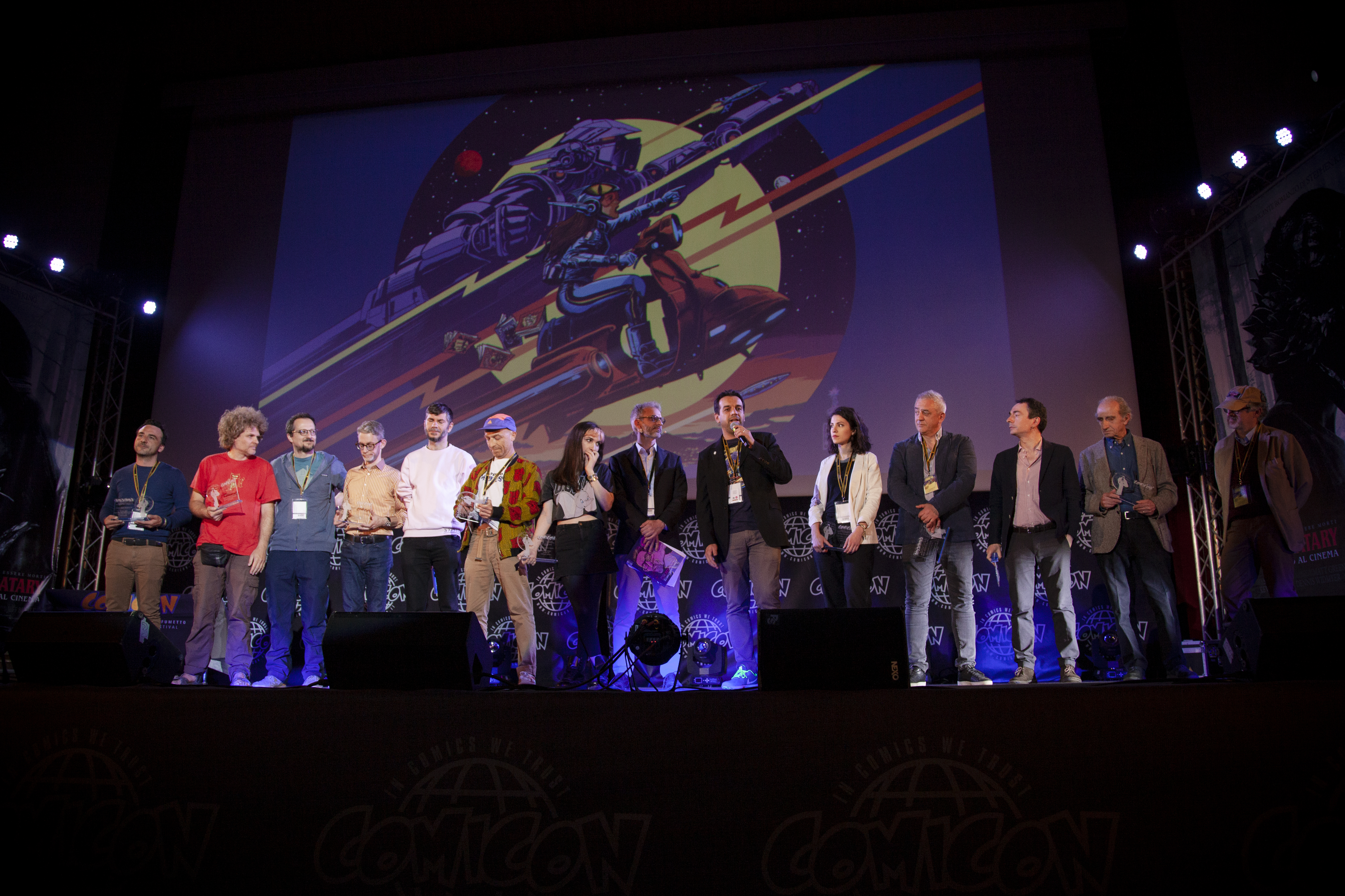 Sul palco dell'Auditorium del Teatro Mediterraneo della Mostra d'Oltremare di Napoli, i vincitori proclamati durante la XXI edizione di COMICON.